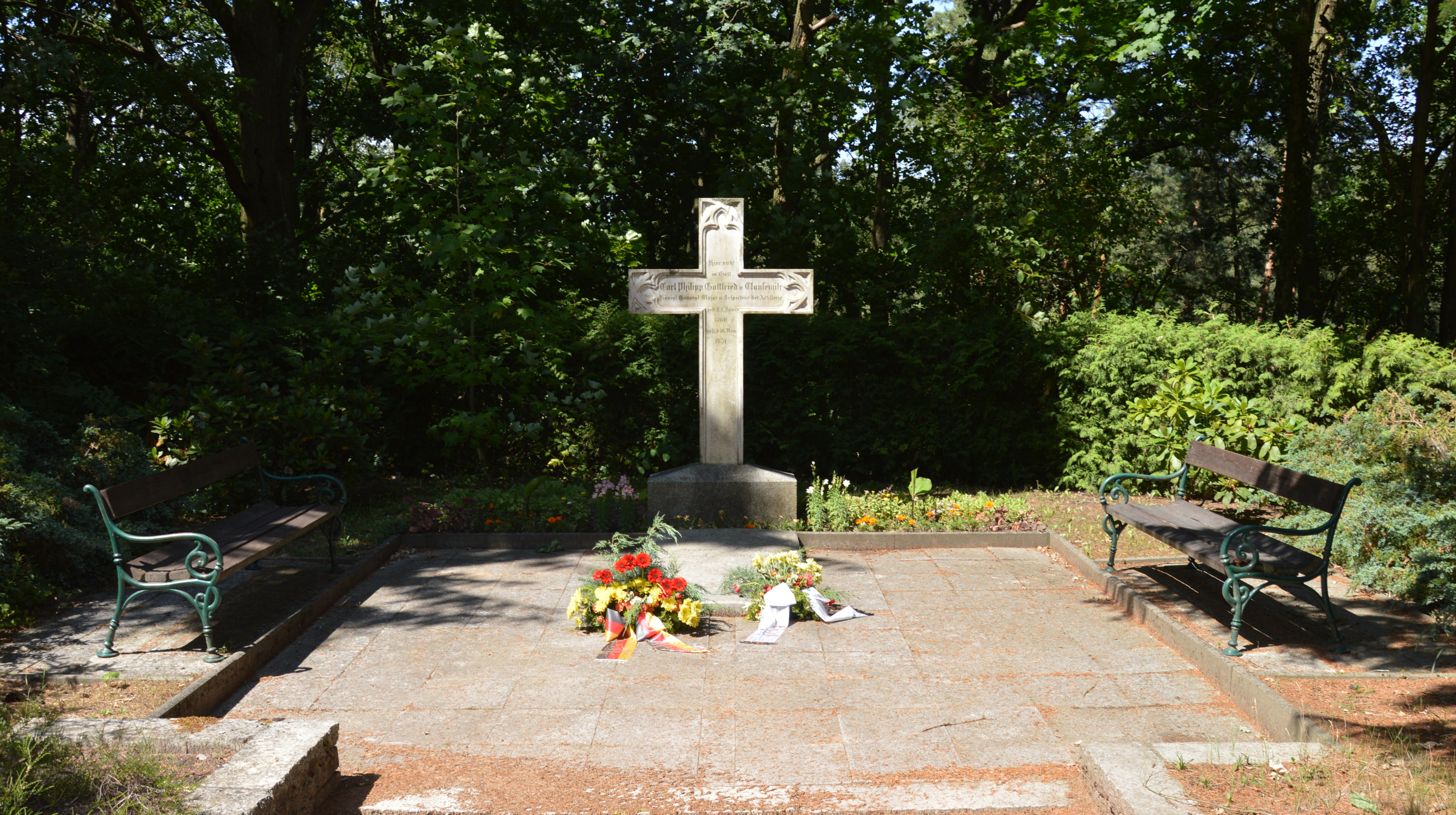 Ostfriedhof Burg Grab von Clausewitz